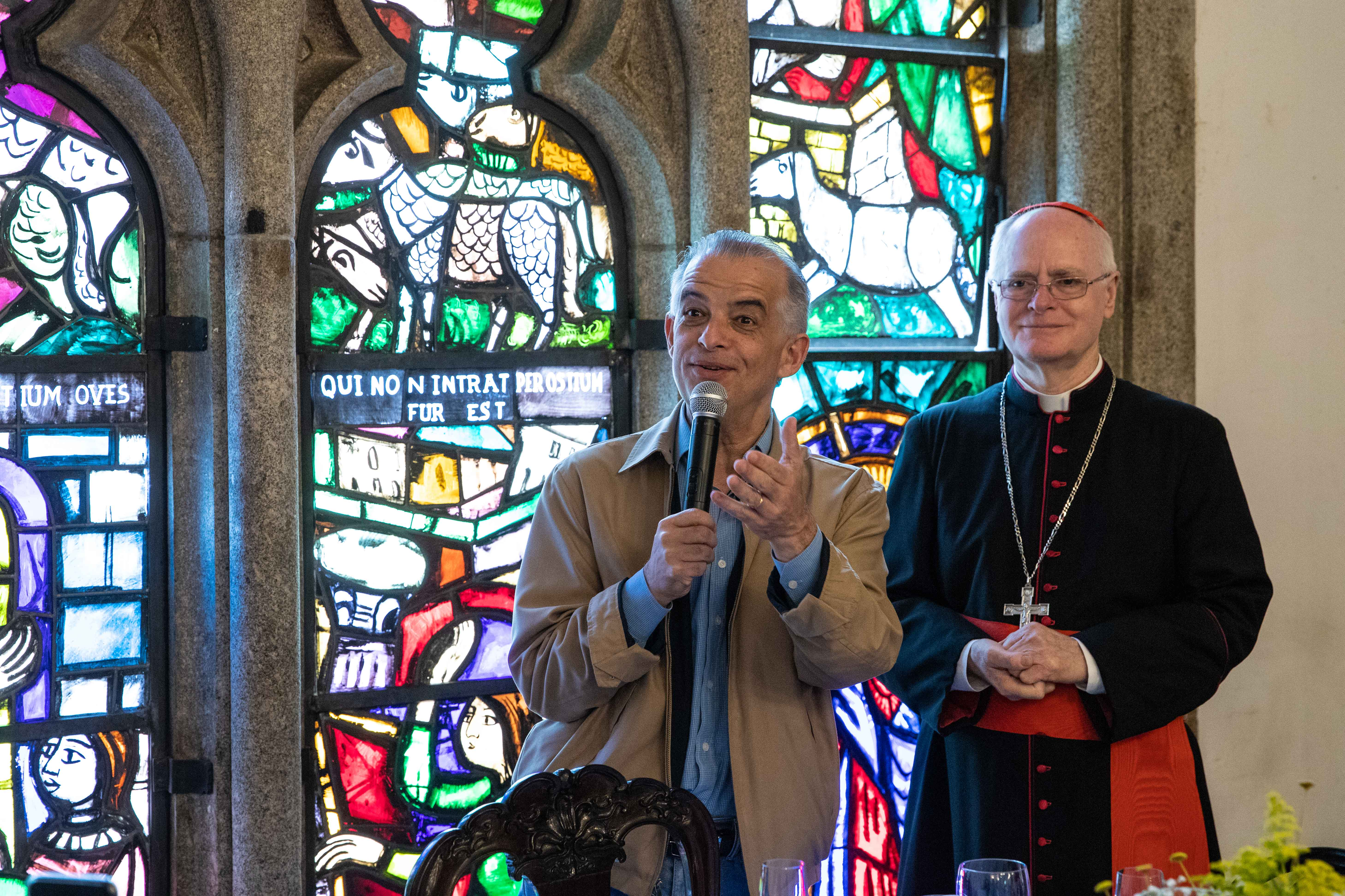 Márcio França e Odilo Scherer em setembro de 2018.